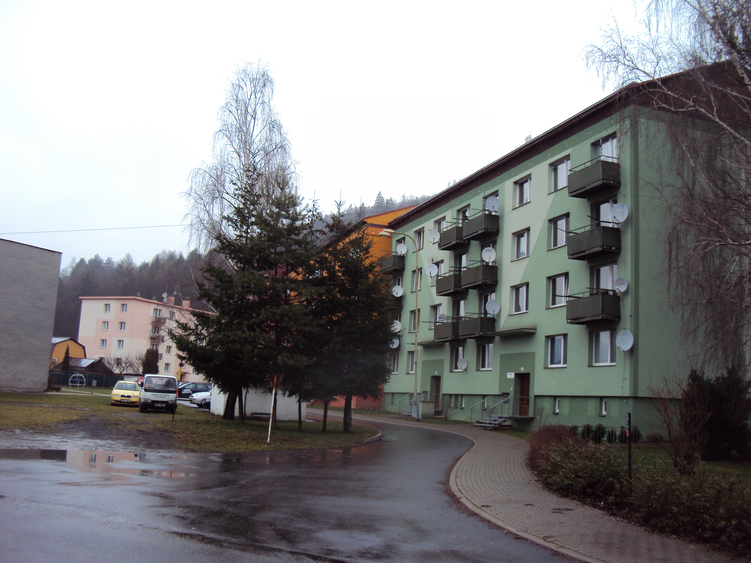 Bohutín nová zástavba